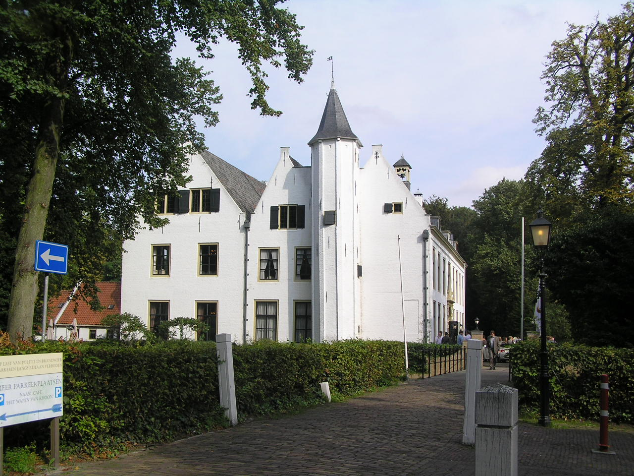 Kasteel van Rhoon Voorkant